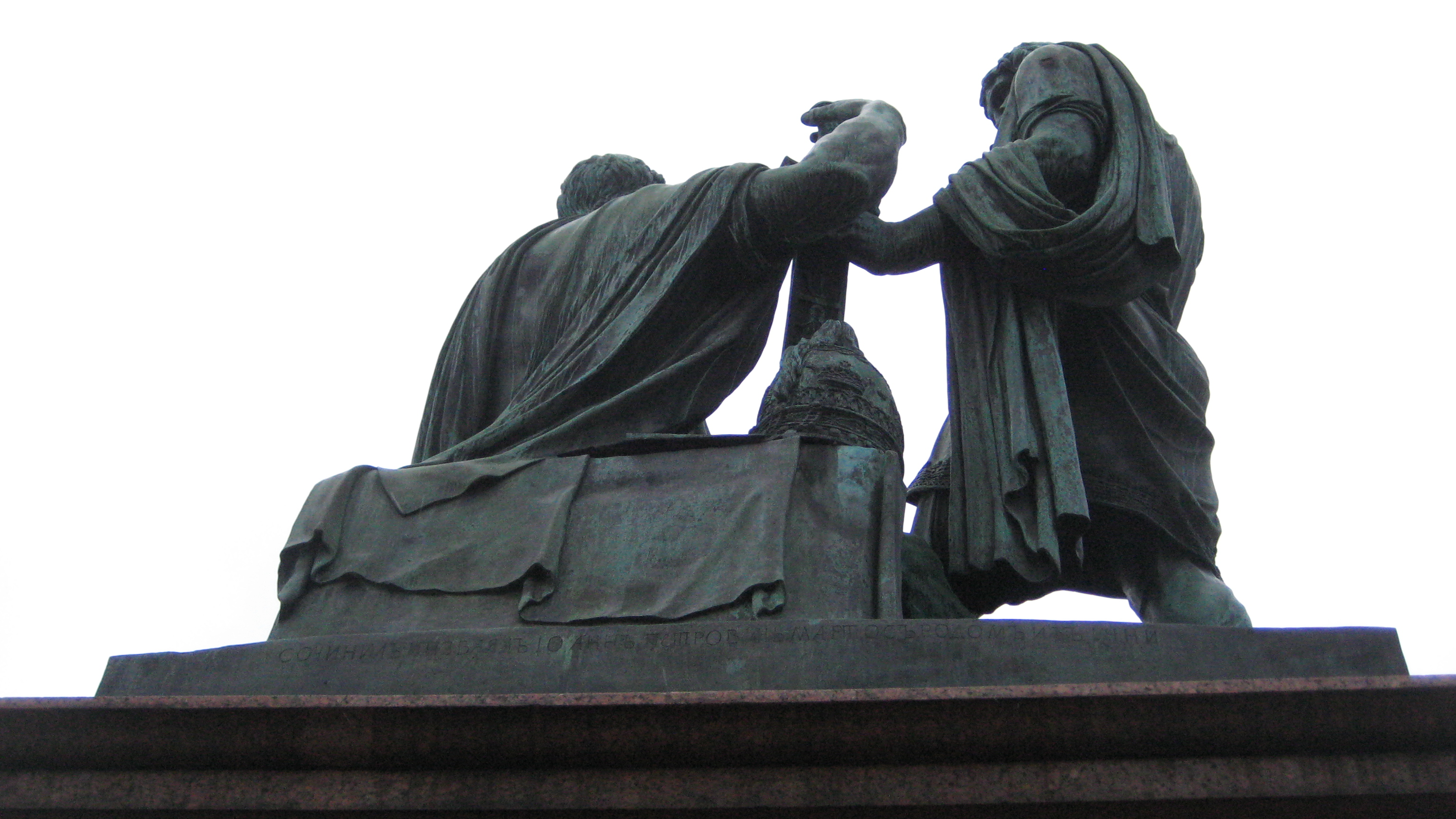 Памятник Минину и Пожарскому.